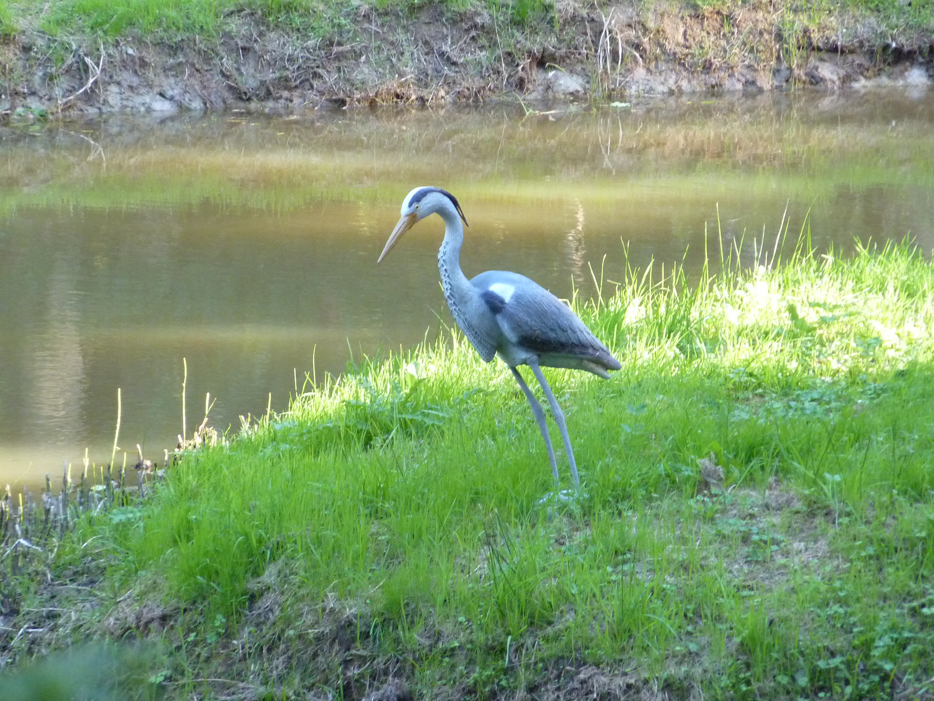 Plouyé : Héron factice en bordure de l'Ellez près de la chapelle Saint-Mathurin